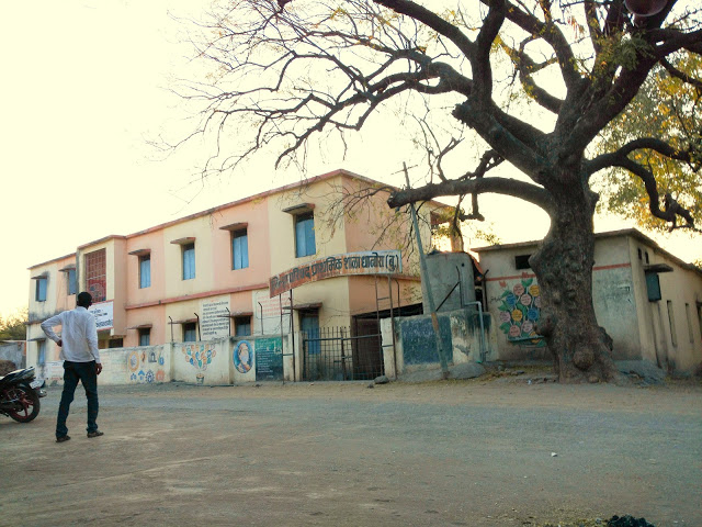 जिल्हा परिषद प्राथमिक शाळा धानोरा (बु.) चा समोरील बाजूचा फोटो ०५/०२/२०१७ रोजी सूर्यास्तावेळी.